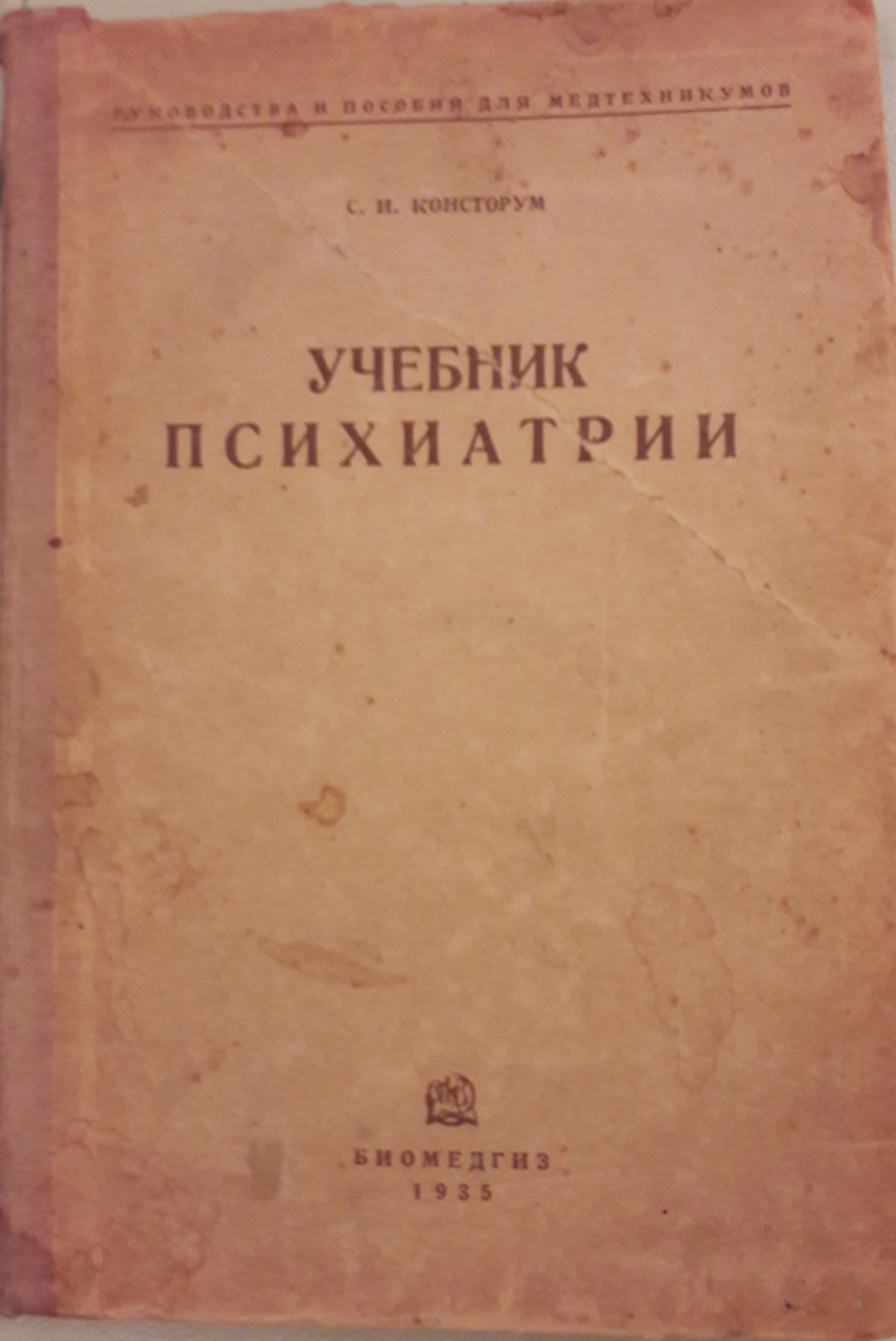 Консторум, Семен Исидорович. Учебник психиатрии : 13 рис. на вклейках / С. И. Консторум. - Москва ; Ленинград : Биомедгиз, 1935 (М. : 16 тип. треста "Полиграфкнига"). - Переплет, 191 с. : ил.; 23х16 см. - (Руководства и пособия для медтехникумов).